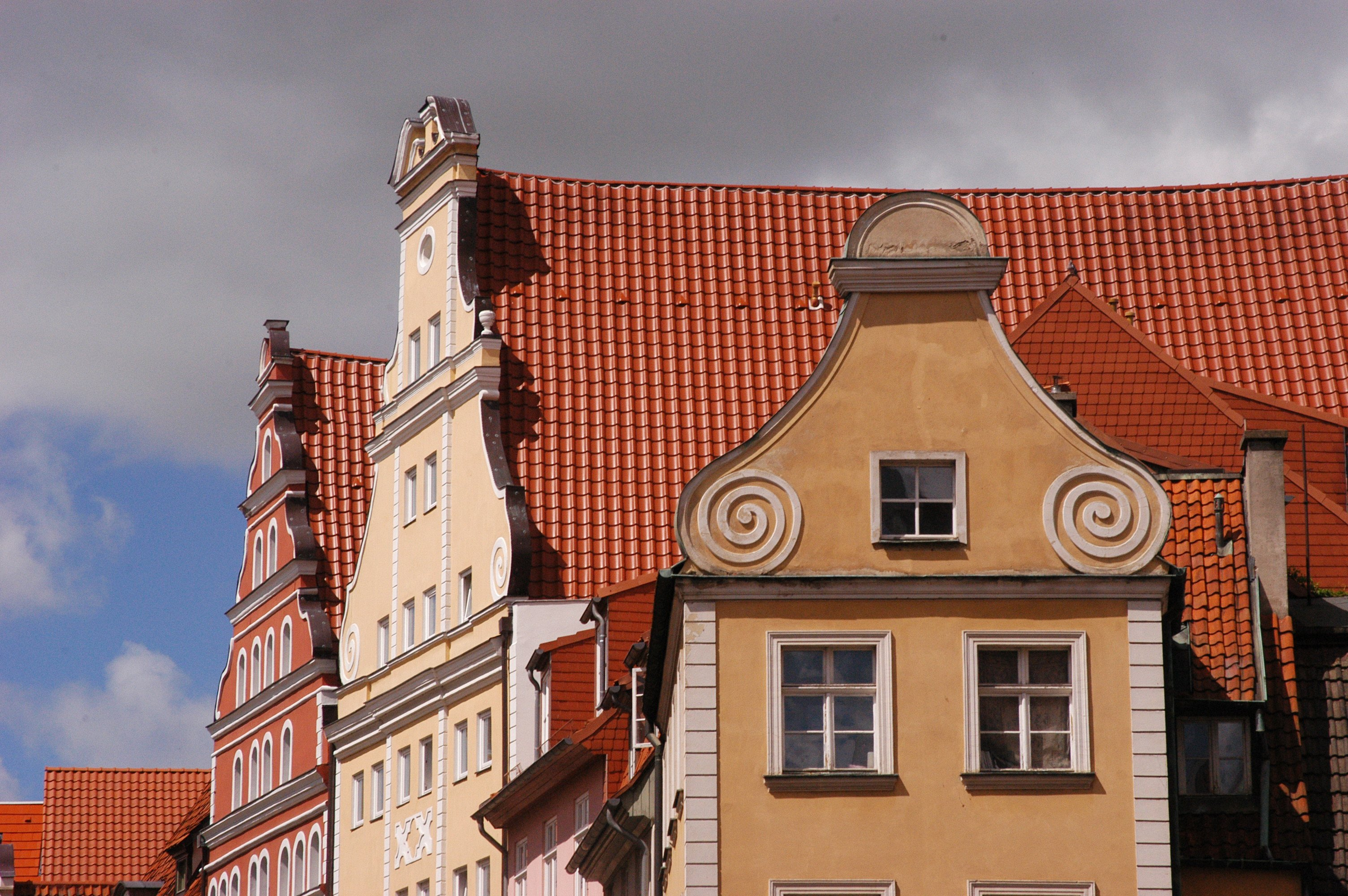 (de) Fassaden mit Renaissance- und Barockgiebeln in Stralsund (D)